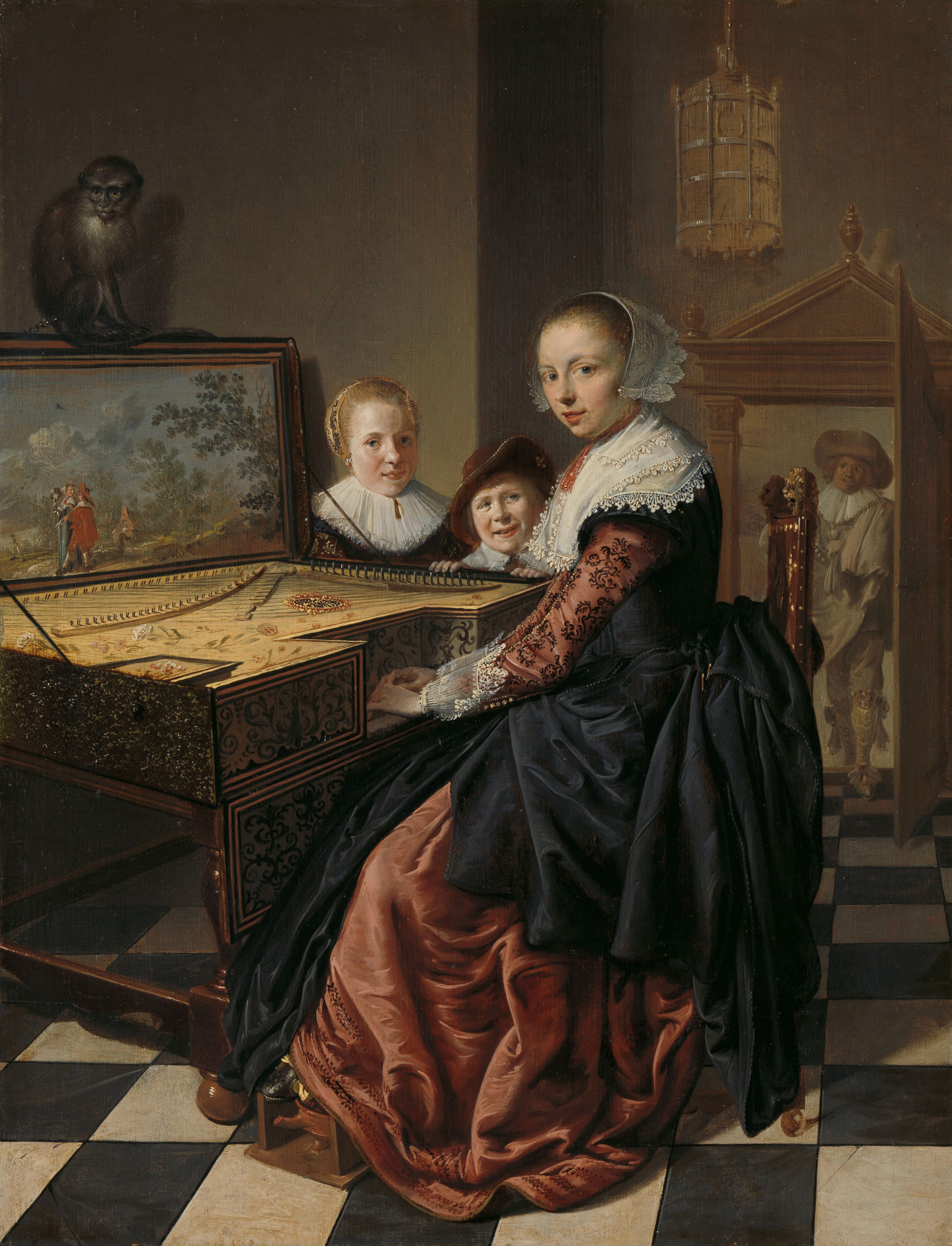 De virginaalspeelster. Interieur met een jonge vrouw spelend op een virginaal. De deksel van het instrument is beschilderd met een voorstelling van een paar in een landschap, op de deksel zit een aap. Achter de virginaal staan een jongetje en een meisje, vermoedelijk een jonger broertje en zusje van de schilder. Rechts een doorkijk naar een man die in de deuropening staat. Aan het plafond hangt een vogelkooi. Vroeger geïnterpreteerd als een portret van Judith Leyster, de echtgenote van de schilder, met haar kinderen.; Jan Miense Molenaer (ca. 1609–1668), olieverf op paneel, 1630–1640